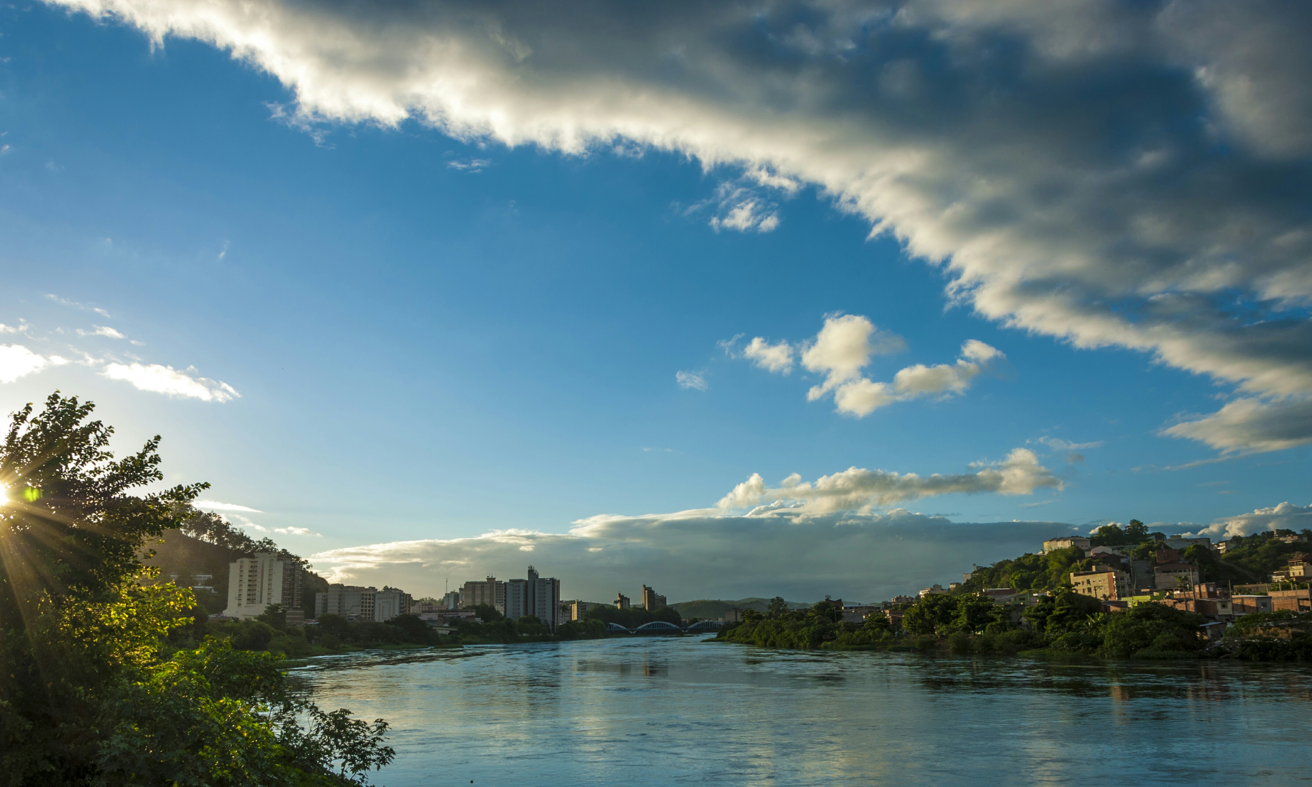 Vista da cidade de Barra Mansa a partir do SESI